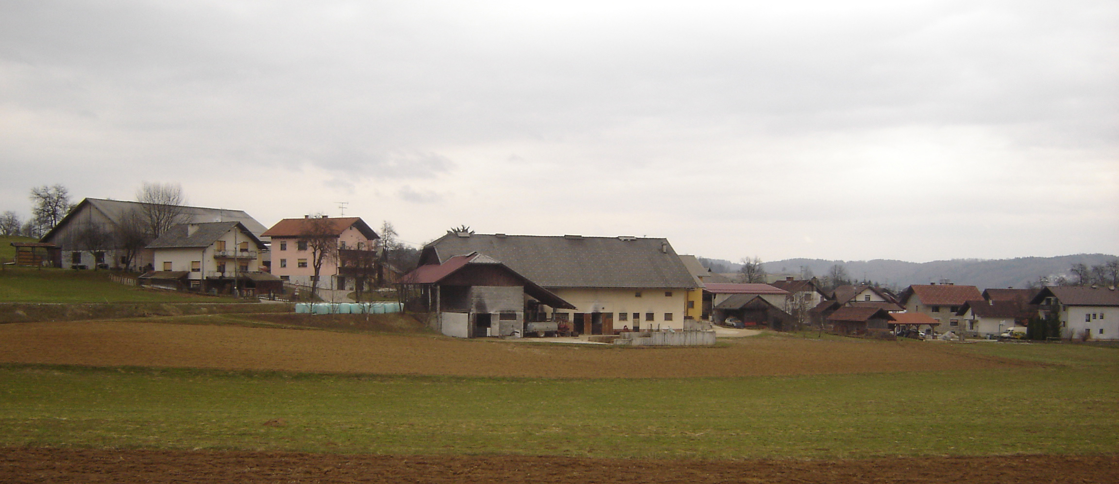 Dob pri Šentvidu.